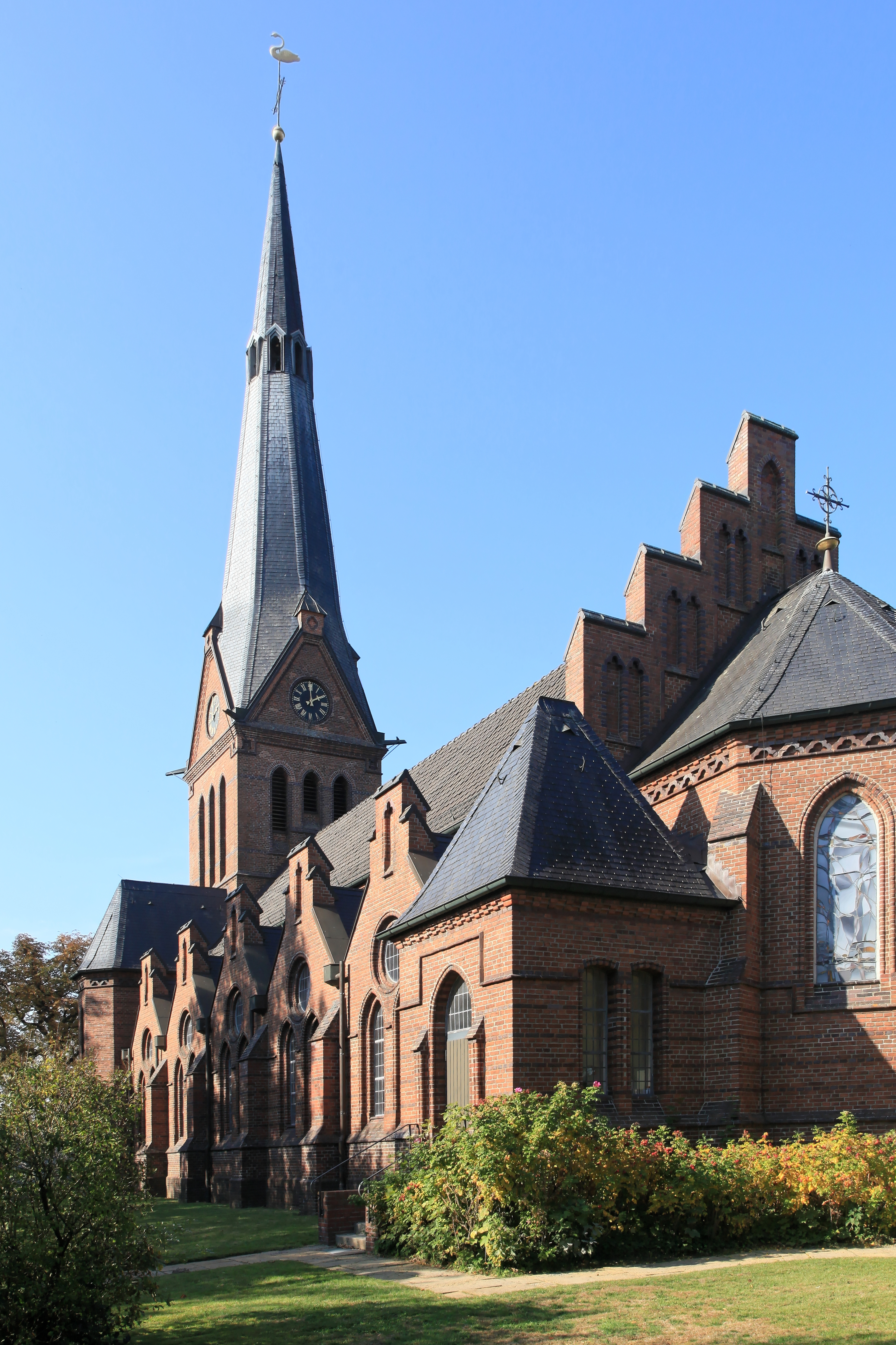 Friedenskirche, Hindenburgstraße in Leer (Ostfriesland)